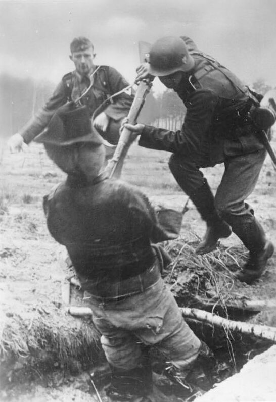 Ausbildung, Grenadier bei Übung mit dem Bajonett Scherl Bilderdienst Wandern: An der Stichpuppe. Die Grenadiere des Infanterieregiments Grossdeutschland, in dem Freiwillige aus allen deutschen Gauen dienen, erhalten eine stramme infanteristische Ausbildung bevor sie zum Einsatz kommen. Übung im Überraschungsgelände. Der Soldat stürmt, beschiesst plötzlich auftauchende Gegner und sticht zum Schluss eine überraschend aufspringende Puppe mit dem Bajonett nieder. Der Ausbilder begleitet diesen Sturmlauf. PK-Aufnahme: Kriegsberichterstatter: Fremke 2622-42 April 42